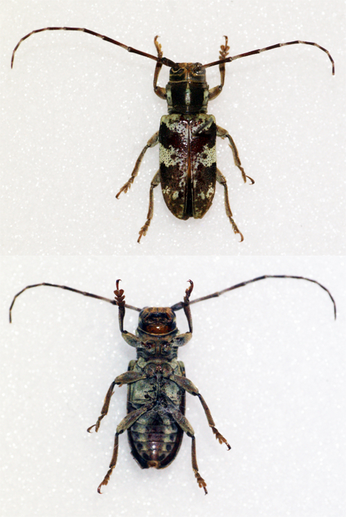 Lameere,1893 Sex: Male Data: 02-2013 - Mbalmayo - Cameroon Size: ?